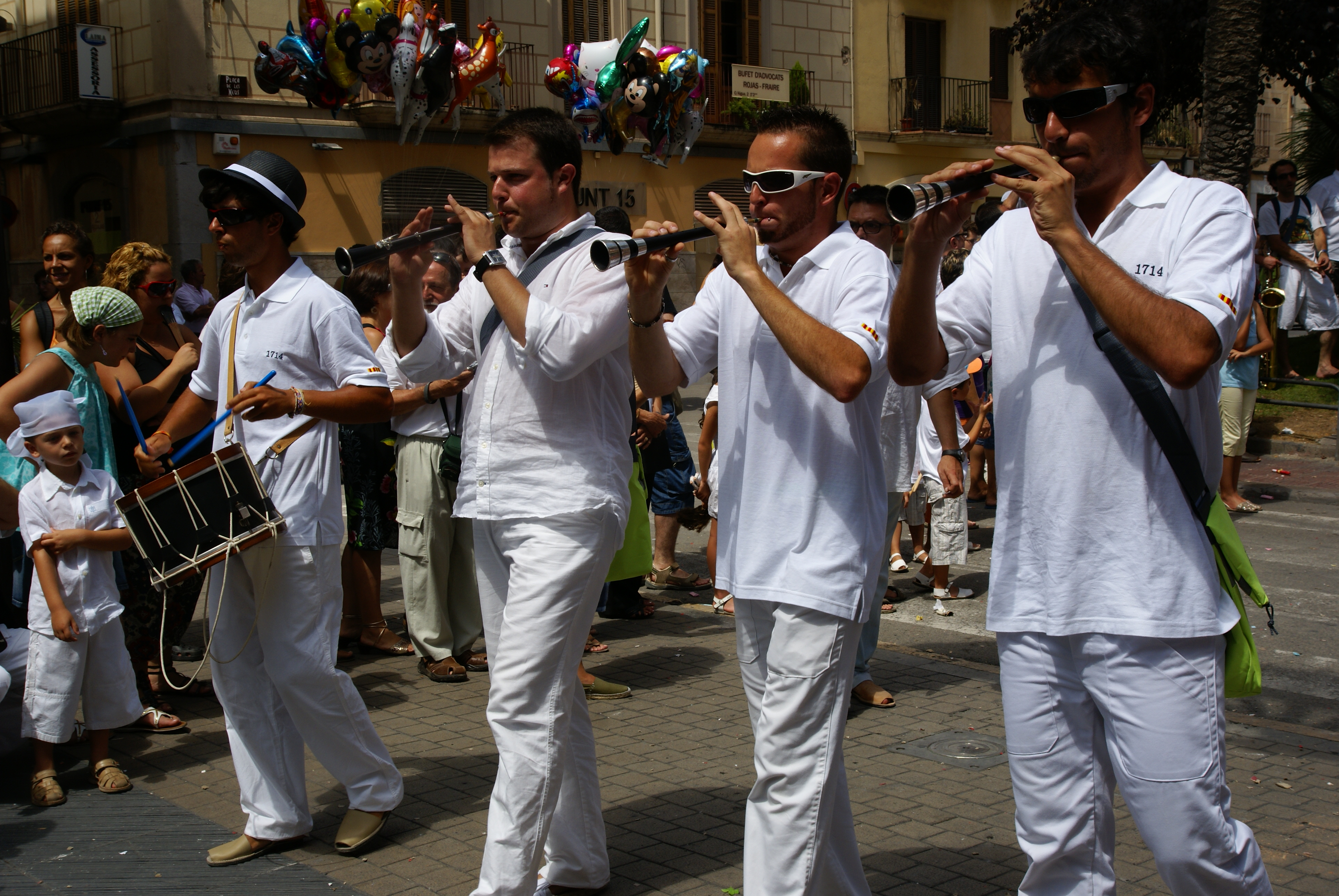 Grallers